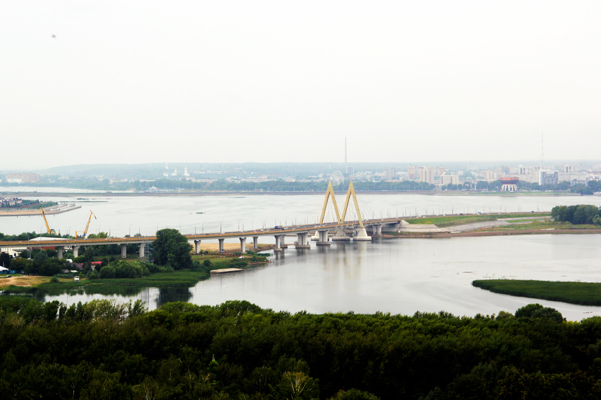 Мост "Миллениум" - Казань